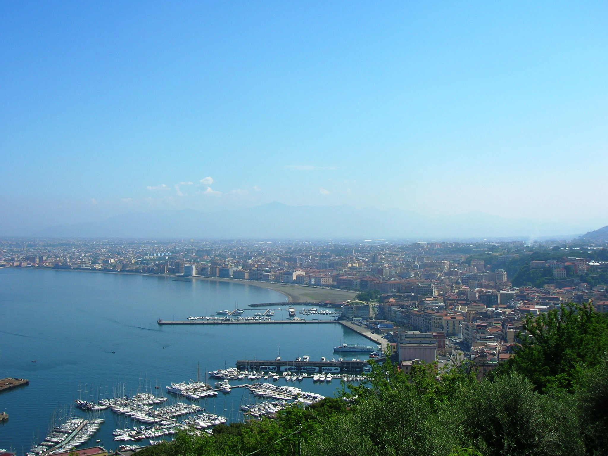 Veduta di Castellammare di Stabia